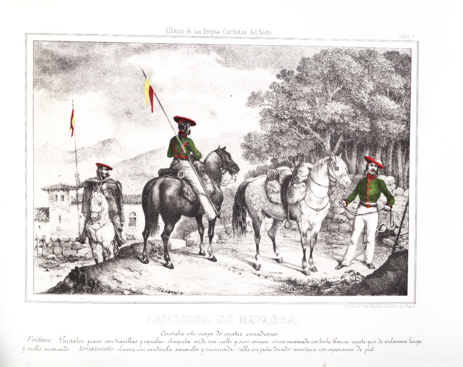 Lanceros de Navarra. "Albúm de las Tropas Carlistas del Norte". Madrid, sin fecha. (184?)